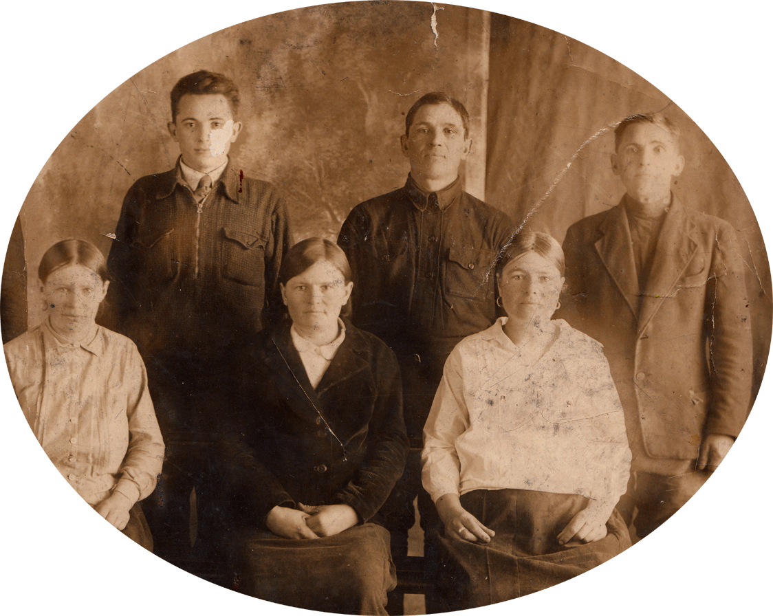 Иван Павлович Кузнецов в окружении братьев